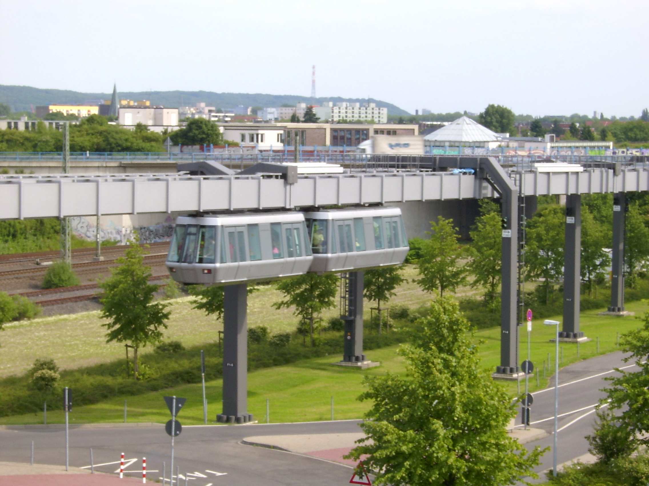 Skytrain des Flughafen Düsseldorf International an der Haltestelle Flughafenbahnhof